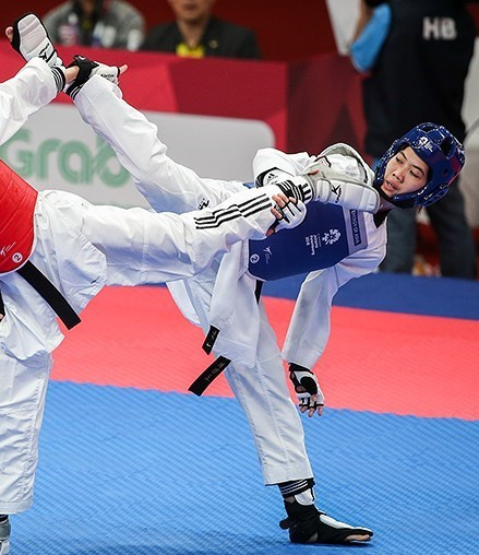 Panipak Wongpattanakit at the 2018 Asian Games